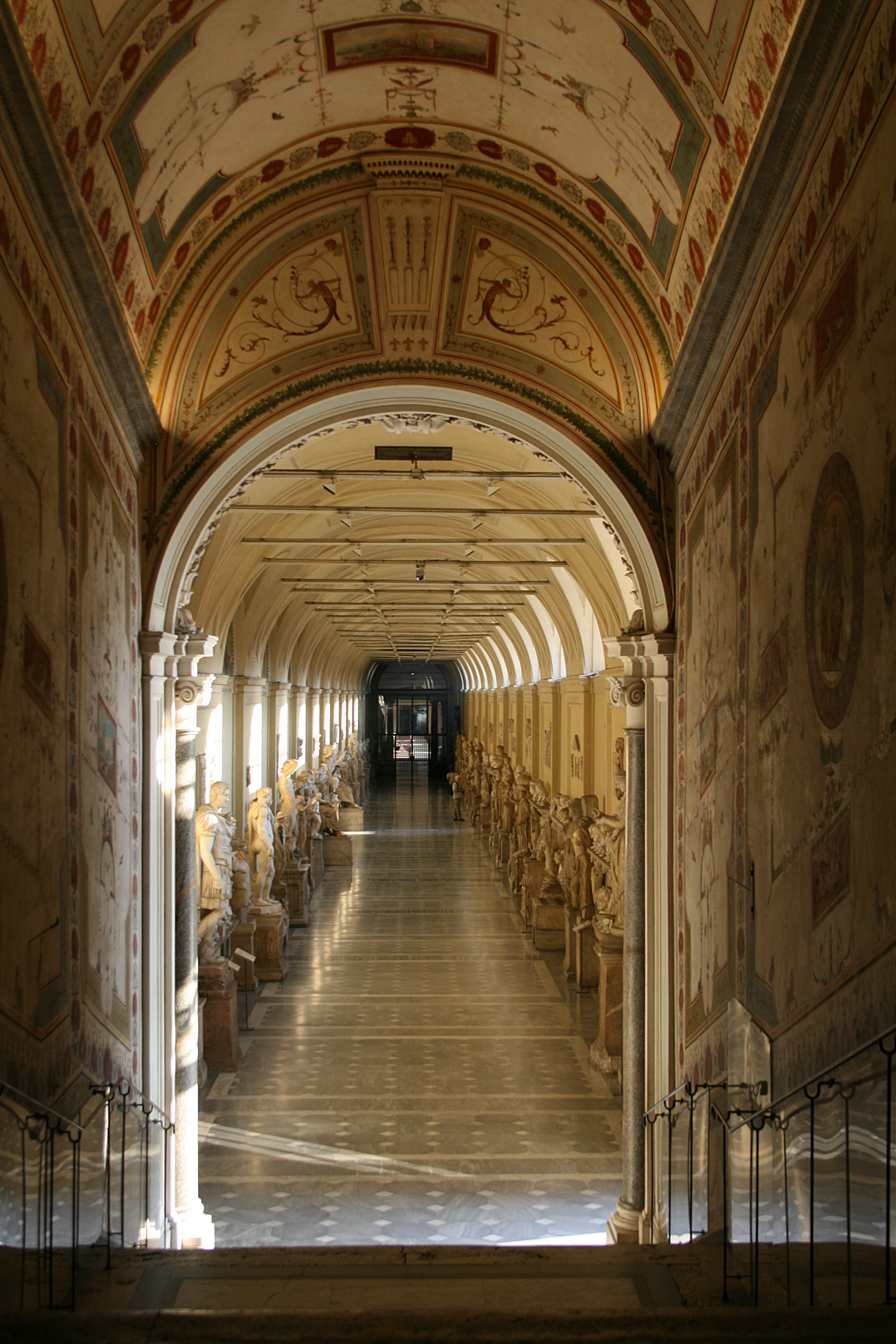 Musée Chiaramonti - Musées du Vatican.